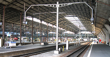 Kopfbahnhof-Zugshalle (Luzern) unterschiedliche Lizenzen Daniel 1992 10:10, 16. Mai 2009 (CEST)